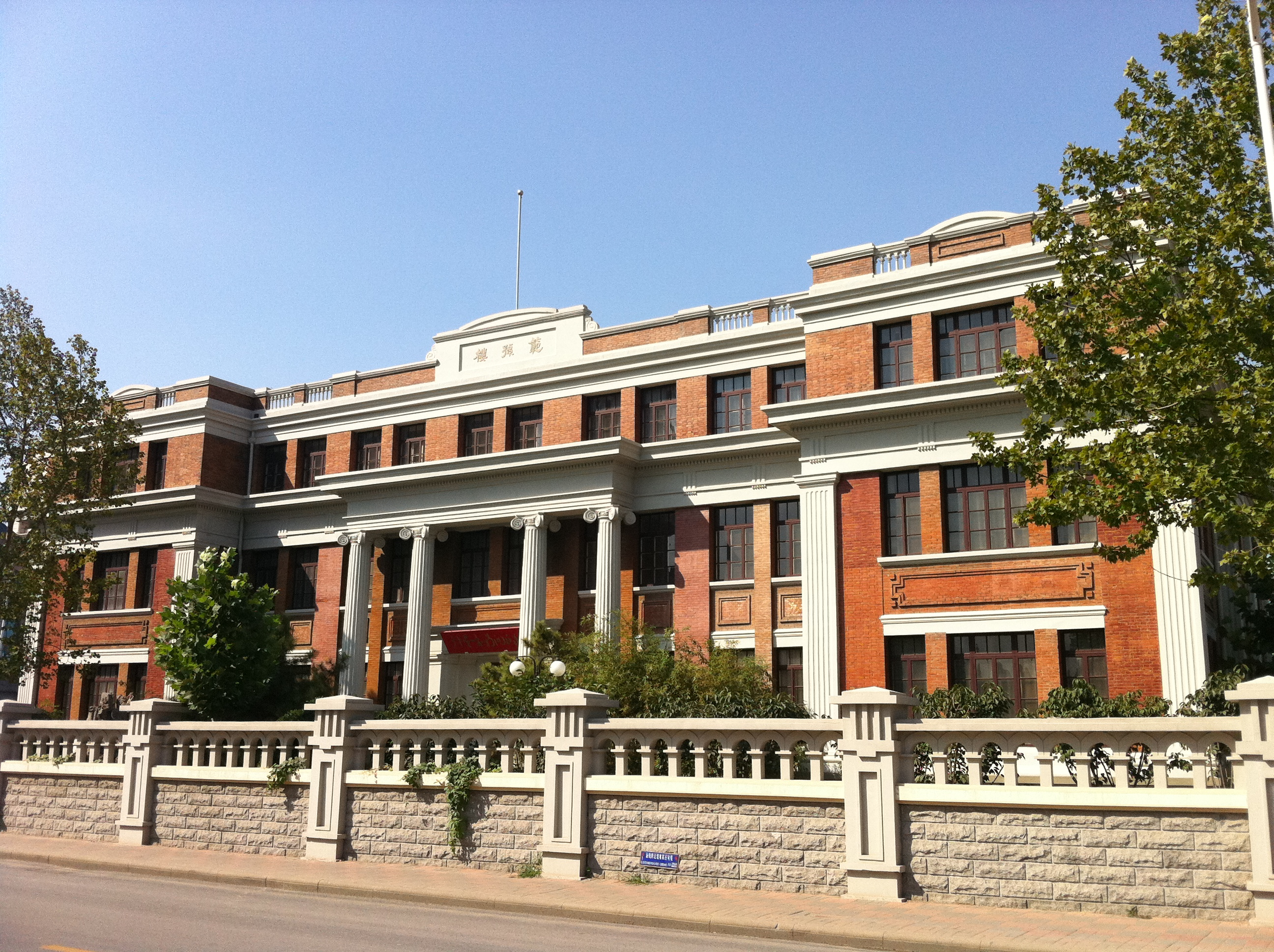 南开中学范孙楼